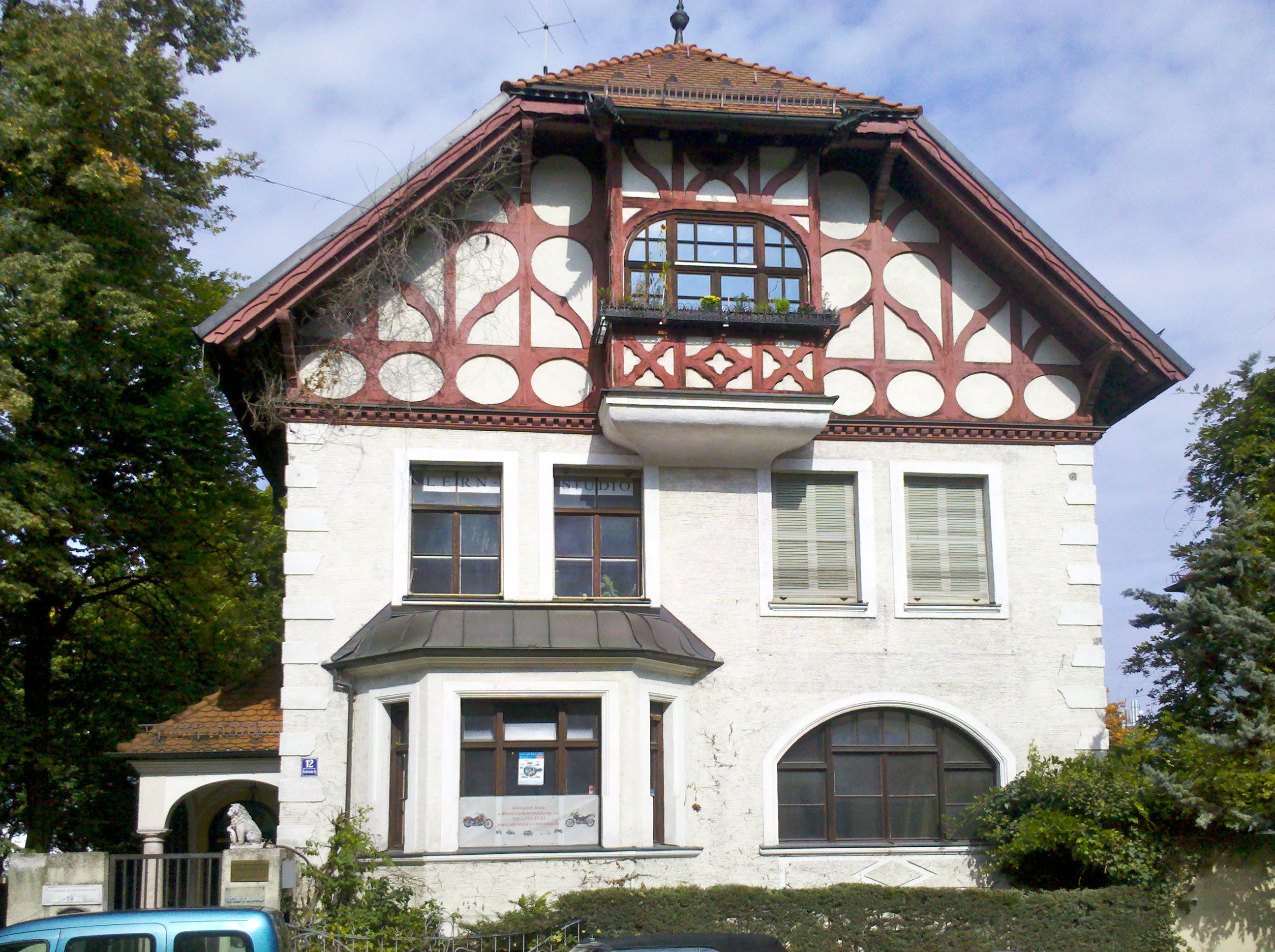 Ansicht der Boschetsrieder Straße 12 in München. (Villa, Landhausstil, 1898 von Heilmann und Littmann.)This is a photograph of an architectural monument.